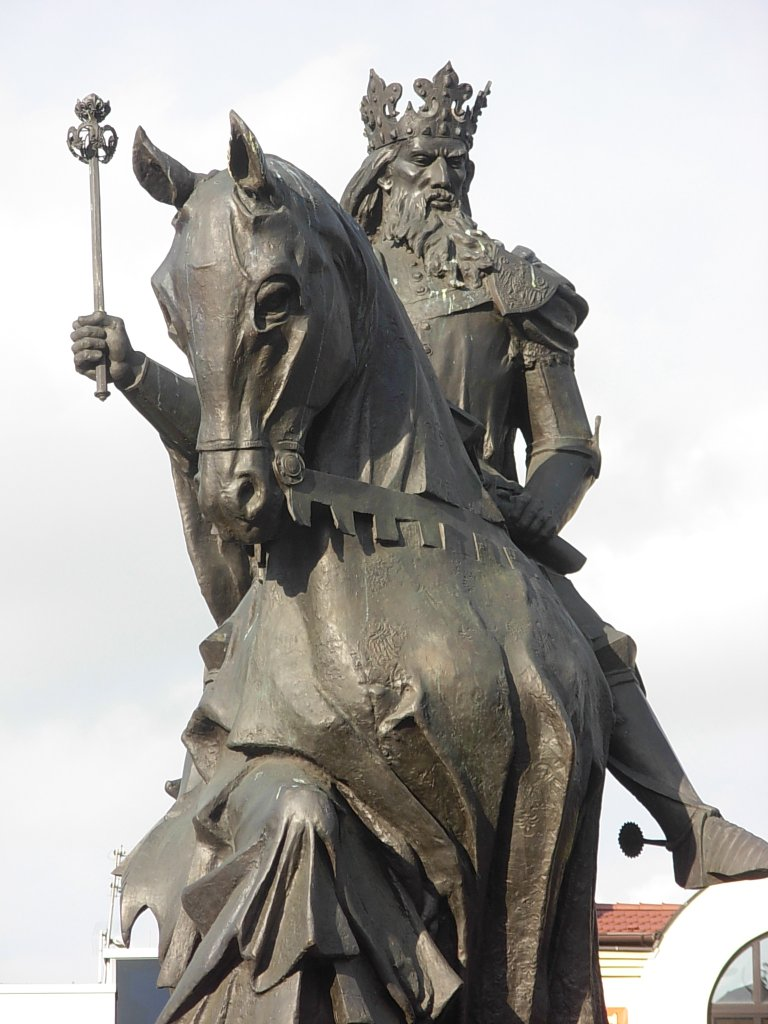 Kazimierz Wielki monument in Bydgoszcz